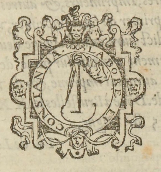 Emblema de la impremta de Christophe Plantin, inclòs a la portada de l'obra " Les singularitez de la France antarctique, autrement nommée Amérique, & de plusieurs terres & isles découvertes de nostre temps" d'André Thevet. A Anvers : De l'imprimerie de Christophle Plantin, 1558.